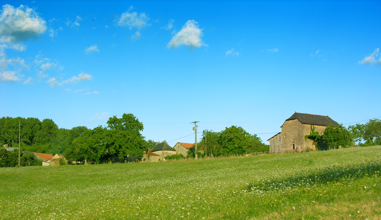 View of hamlet Le Rieu in commune of La Bastide-l'Évêque, Aveyron, France.